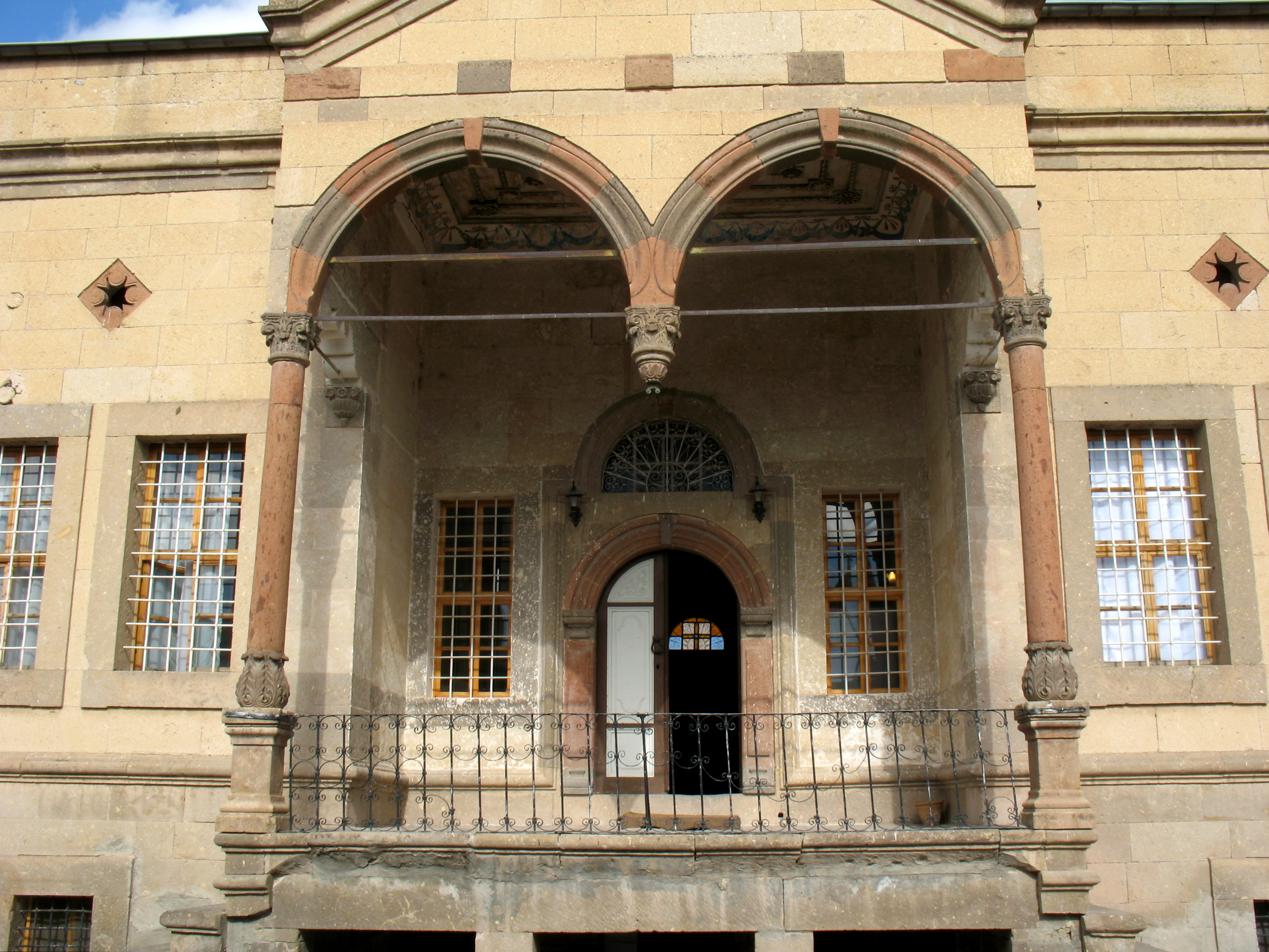 Кападокия_1563